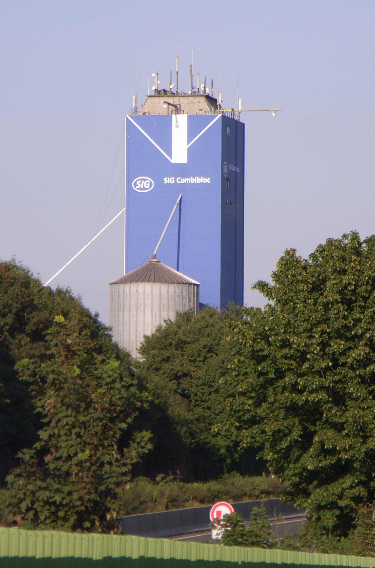 Jüchen, NRW; Speicher mit Werbung für Sic Combibloc Verpackung an der A46